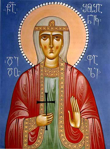 Изображение святой царицы Шушаники (V век)